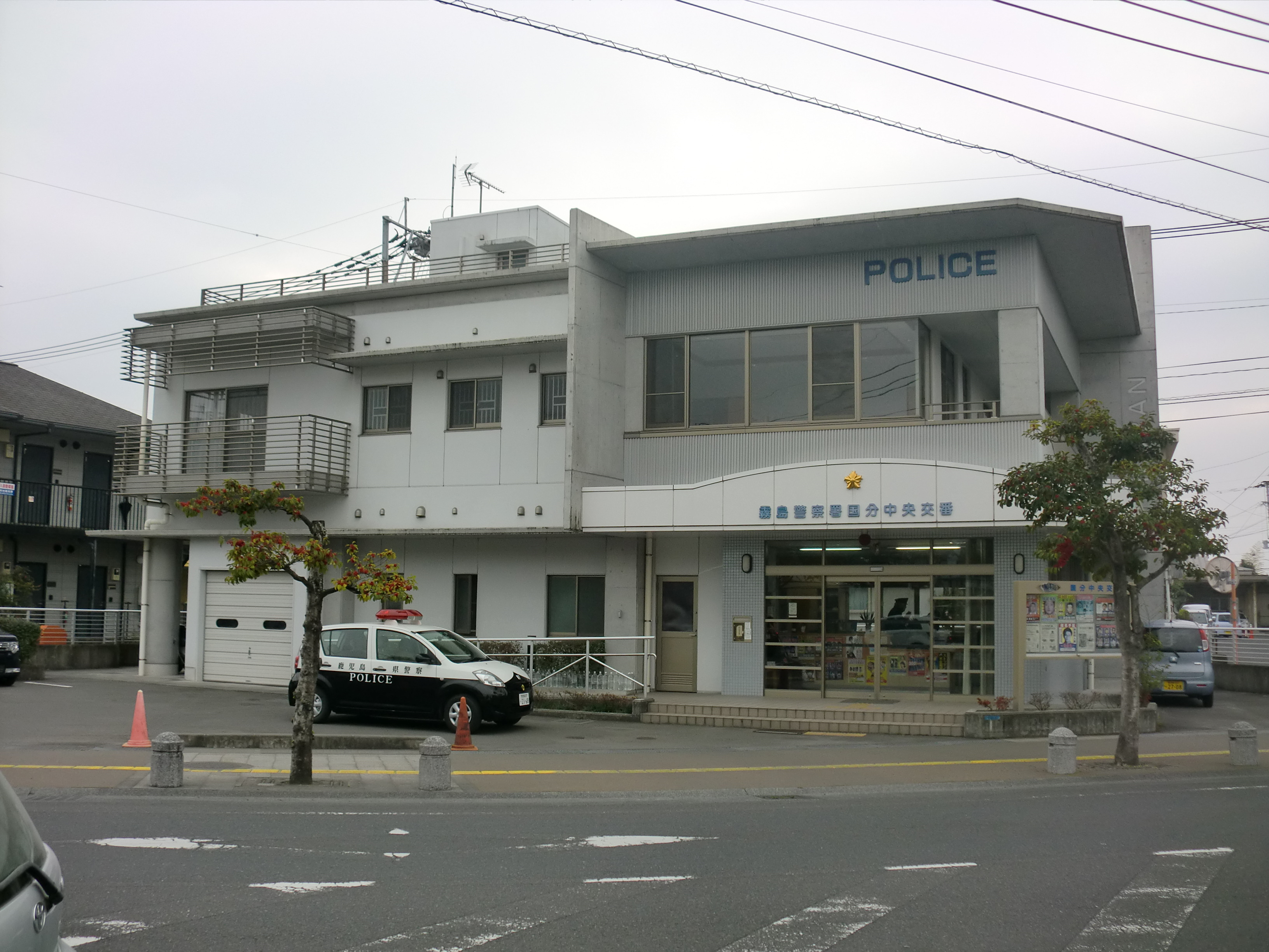 霧島市にある霧島警察署国分中央交番